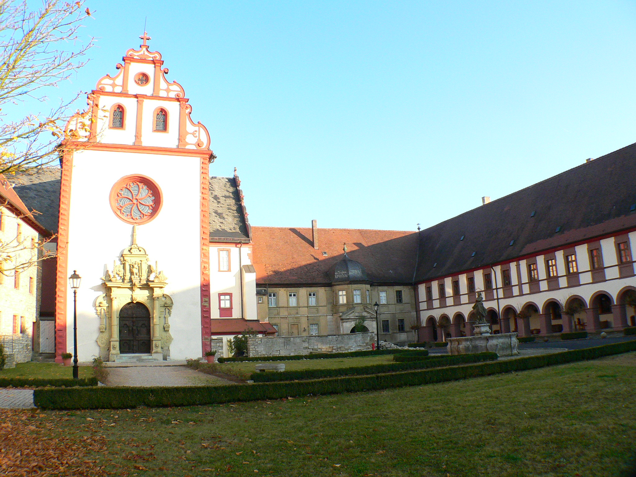 Ehemaliges Kartäuserkloster Tückelhausen, Ochsenfurt, Bayern: Klosterkirche und Klosterhof